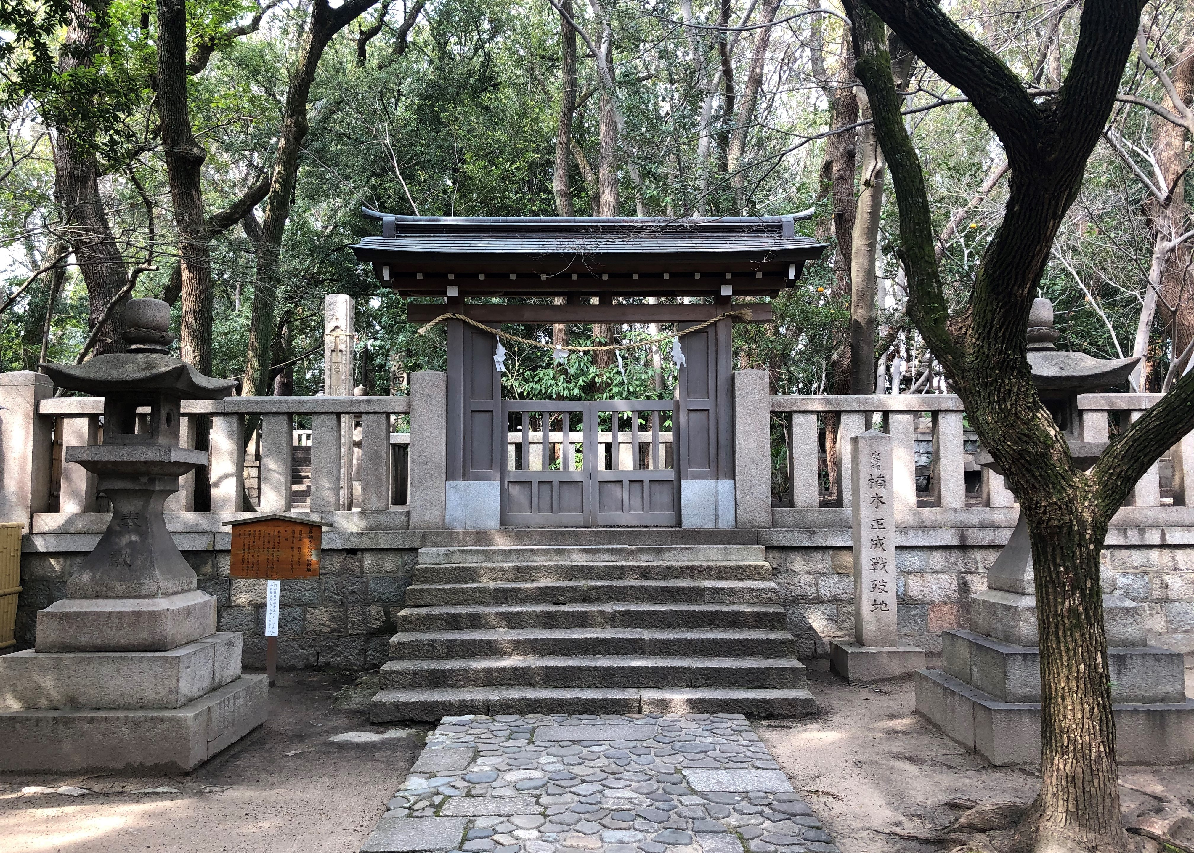 湊川神社 楠木正成殉節地